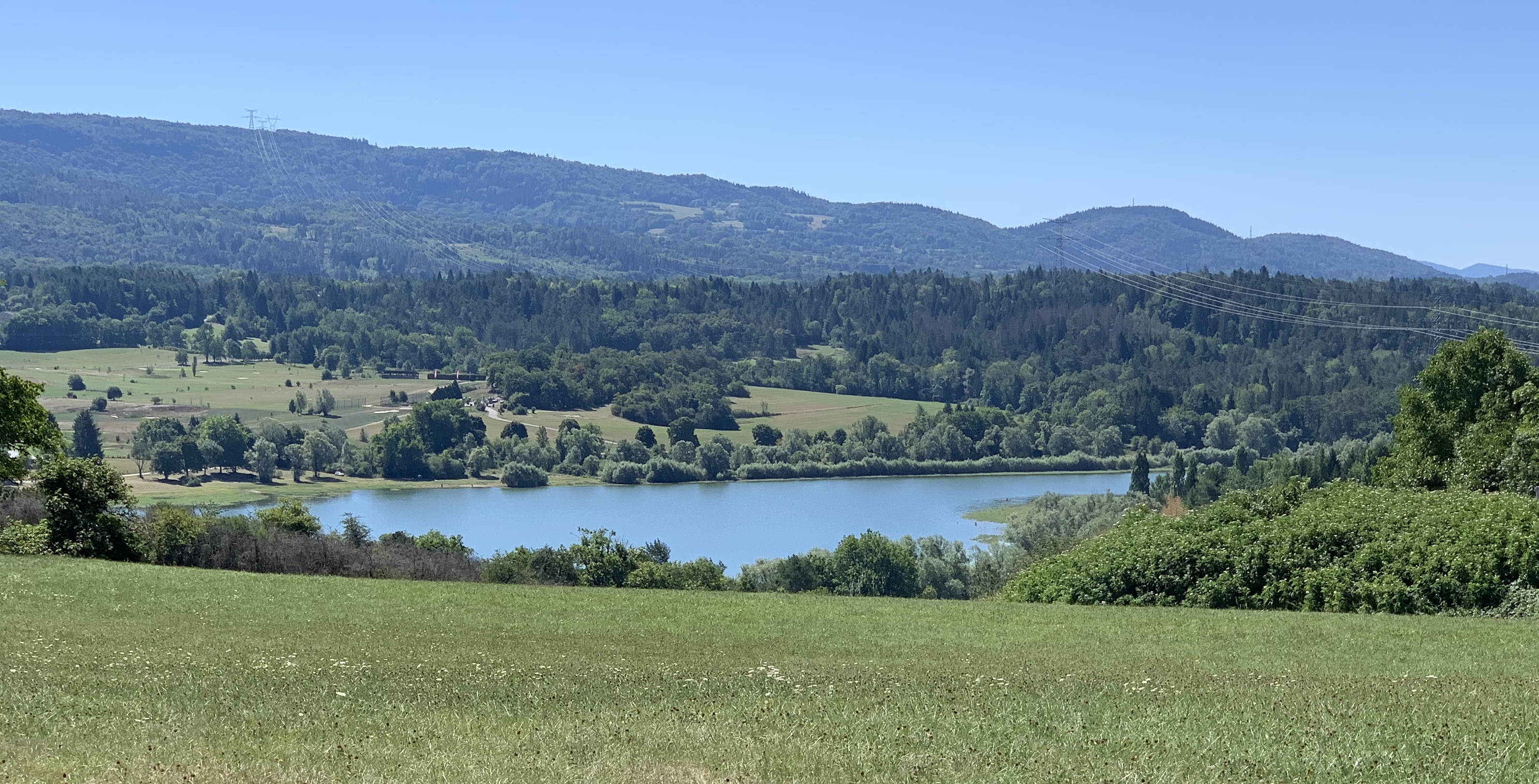 Le lac du barrage de Charmine (août 2020).